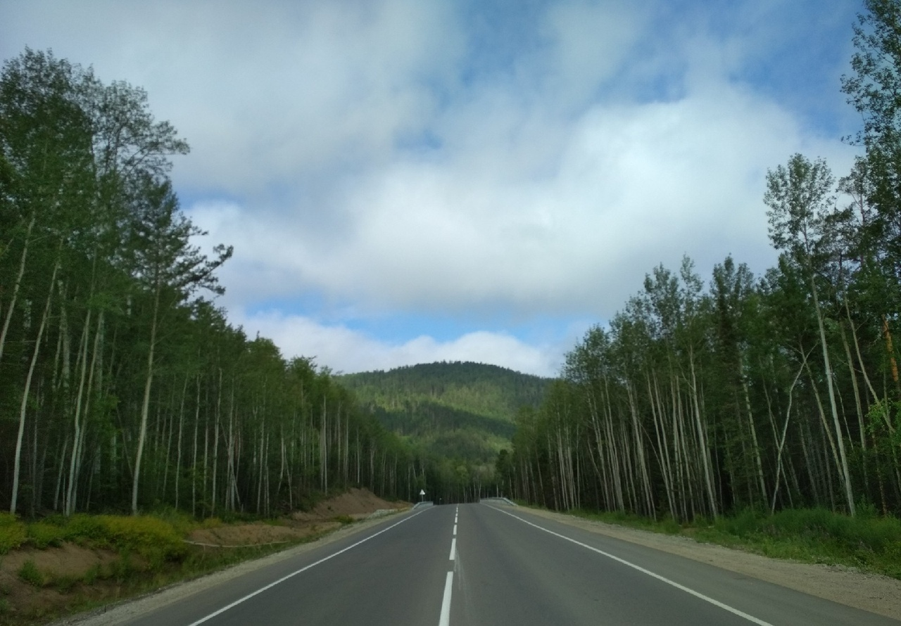 Автодорога Улан-Удэ-Максимиха